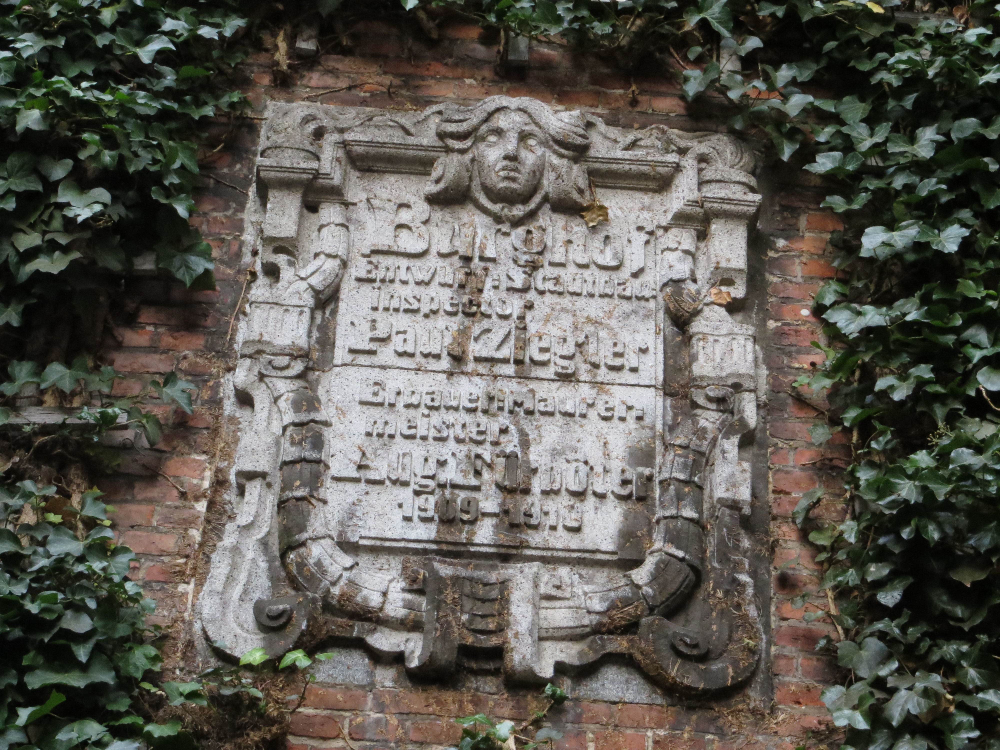 Burghof-Tafel, Entwurf Stadtbauinspector Paul Ziegler, Erbaut 1909-1910, Bild 2